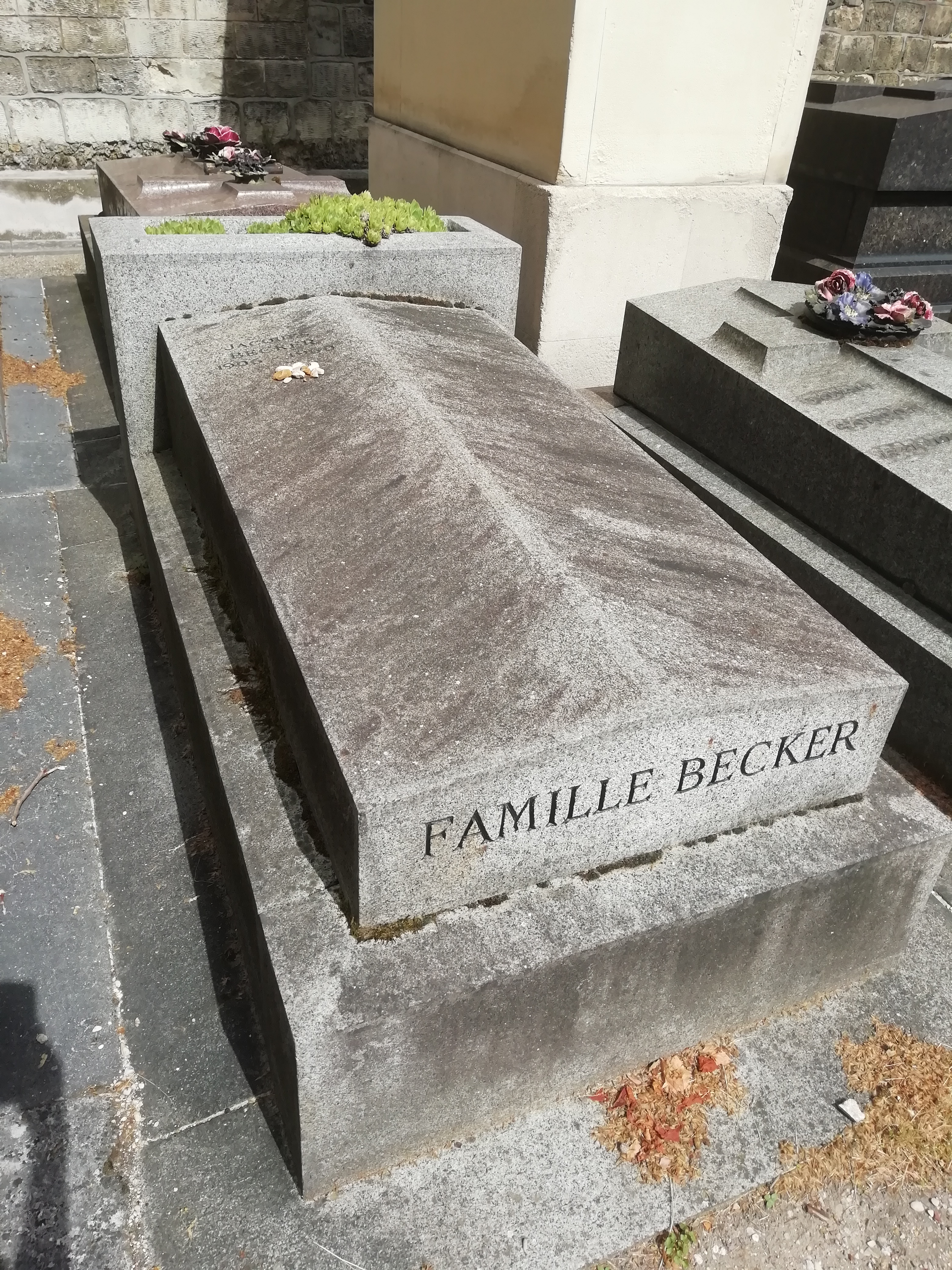 Tombe de Jacques Becker au cimetière du Montparnasse.